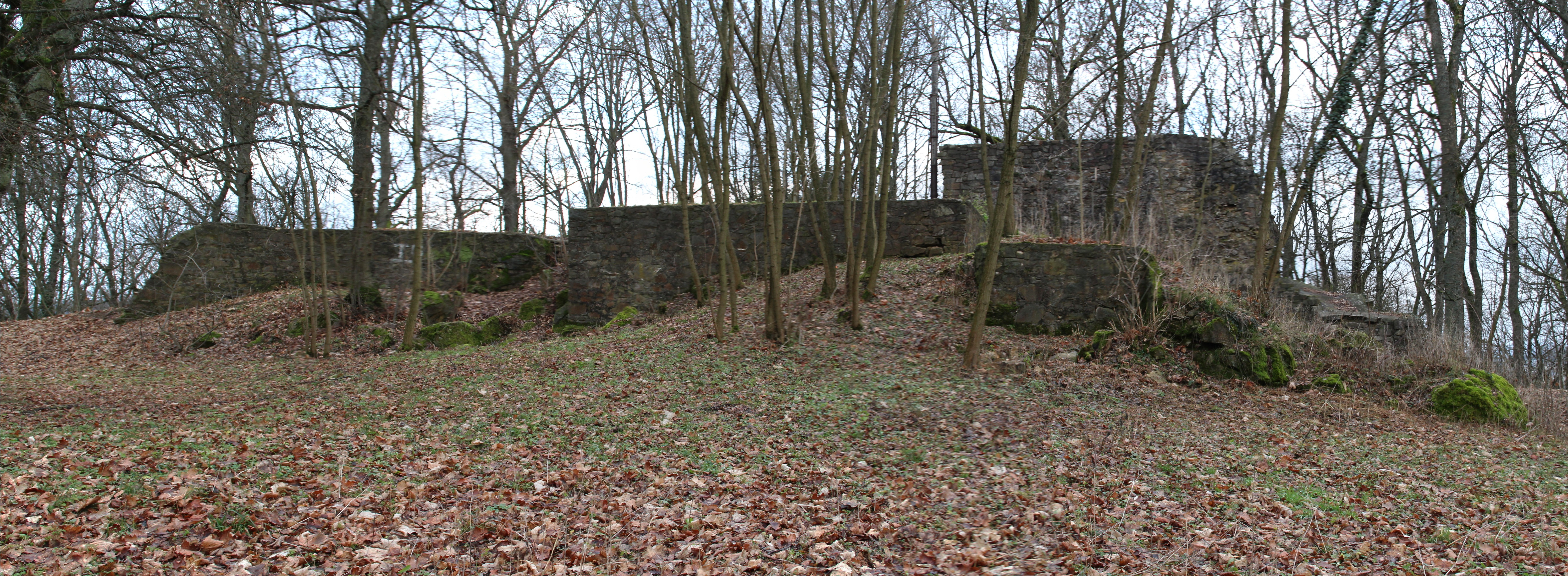 Ruine